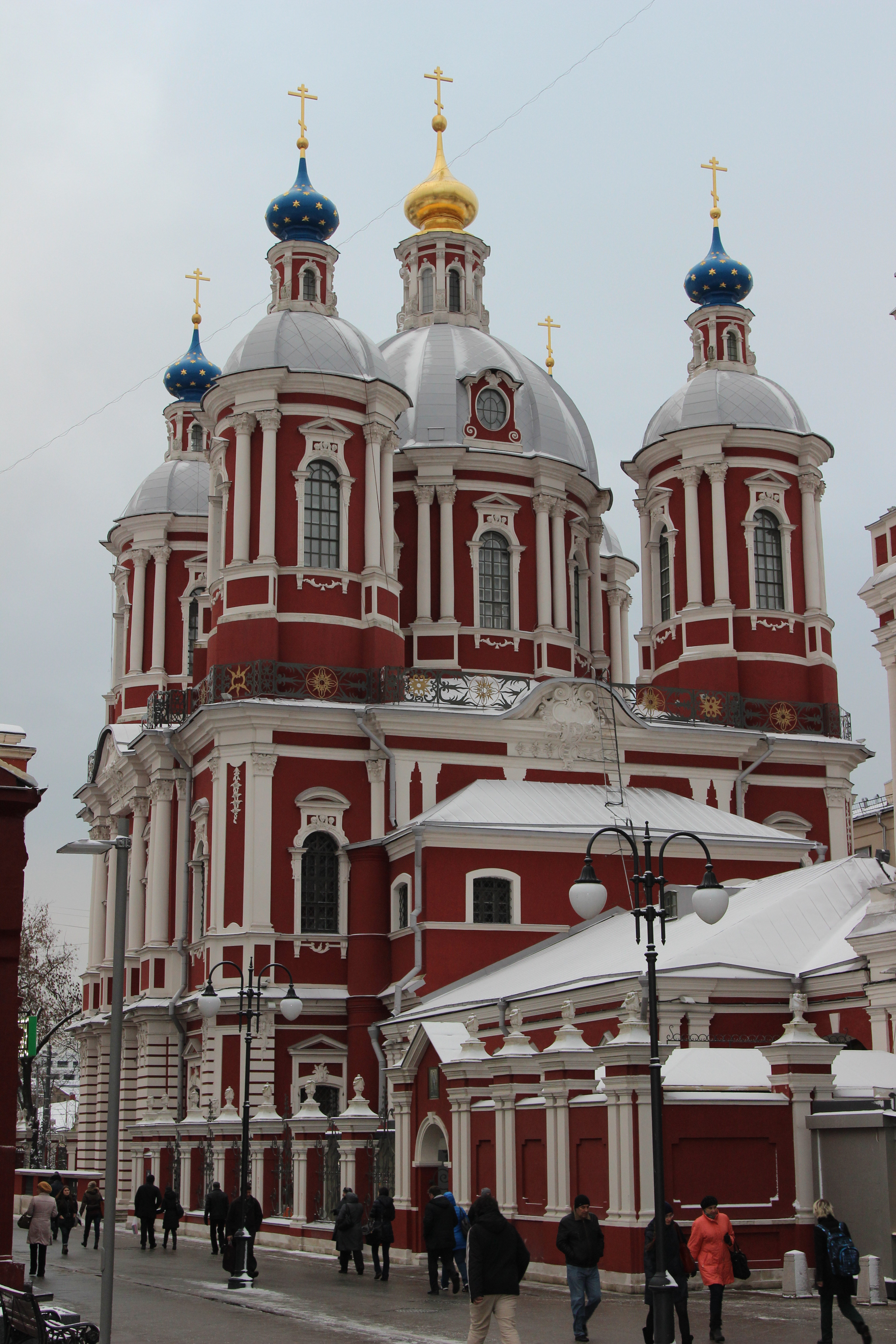 Церковь священномученика Климента, папы Римского (Спаса Преображения) (Москва и Московская область, Москва, Пятницкая улица, 26 строение 1; Климентовский переулок, 7)